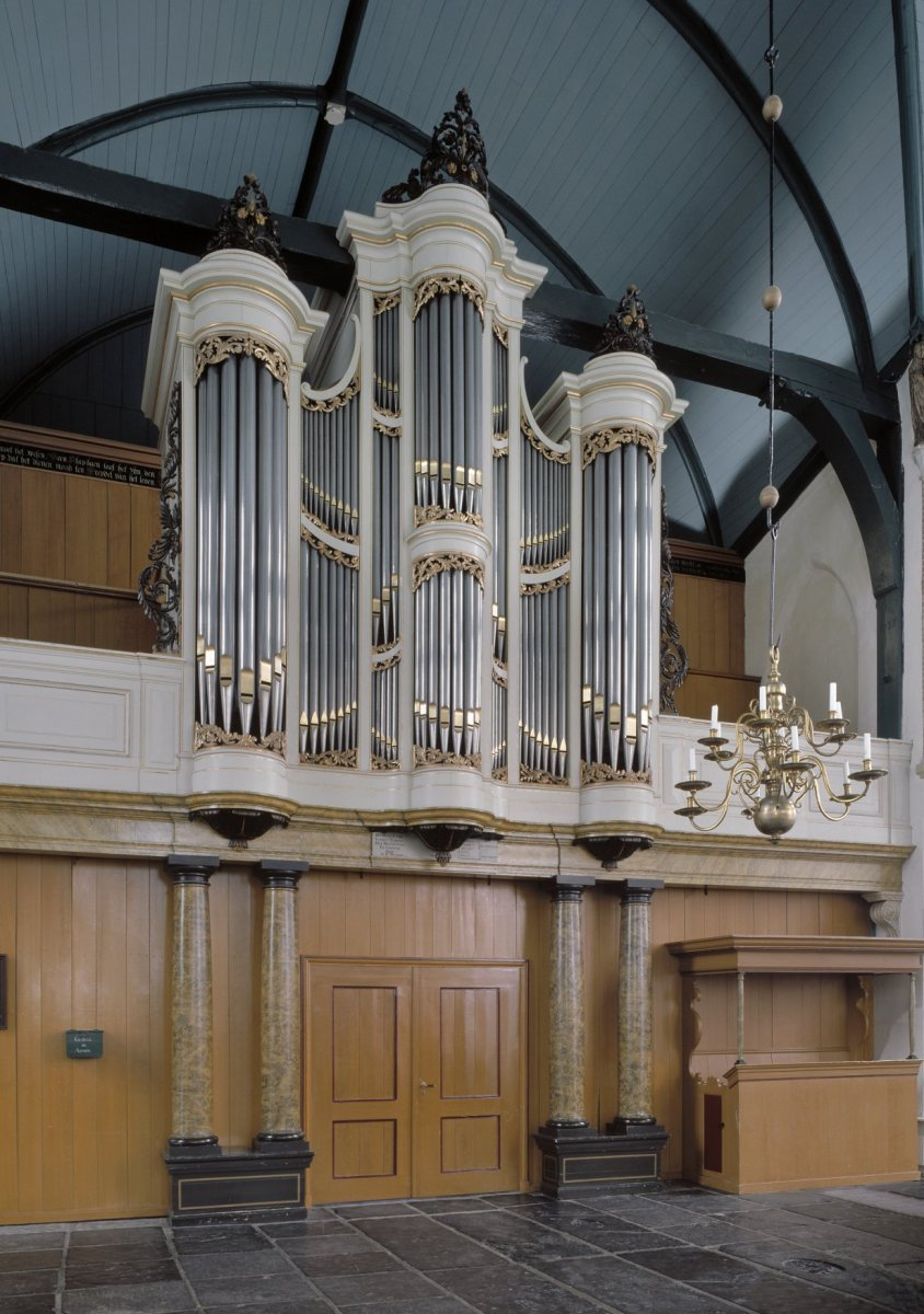 Nederlands Hervormde Kerk: Interieur, aanzicht orgel, orgelnummer 1558 (opmerking: Gefotografeerd voor Het Historische Orgel in Nederland 1850-1858)